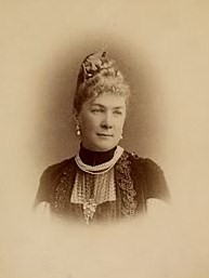 Гофмейстерина Её Императорского Высочества Великой Княгини Елизаветы Фёдоровны, графиня Александра Андреевна Олсуфьева (1846—1929)